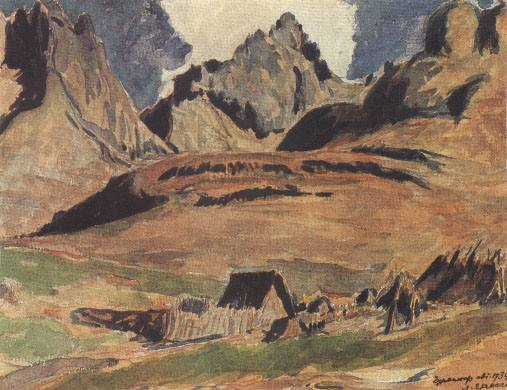 Lazar Drljaca, Durmitor - Dobri Do, août 1934, aquarelle 223 x 288 mm